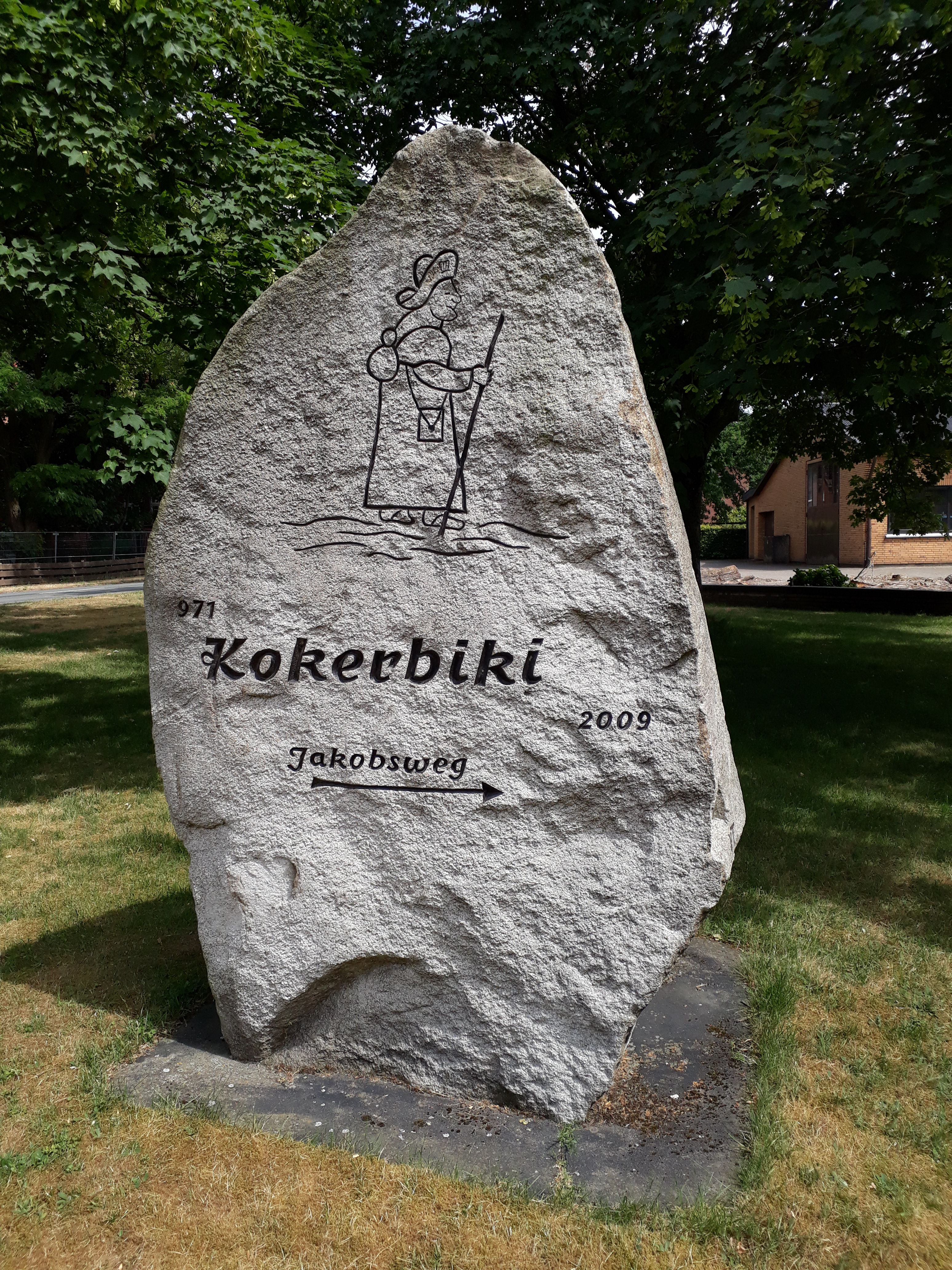 Gedenkstein am Jakobsweg in Kakerbeck, Ahlerstedt.